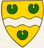 Oanbean troch Rudolf J. Broersma, tekener Fryske Rie foar Heraldyk